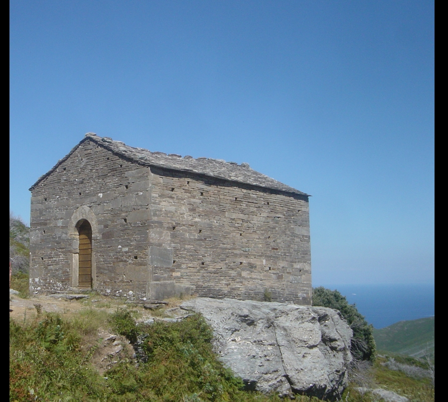 Chapelle "San Michele" à Sisco en Corse